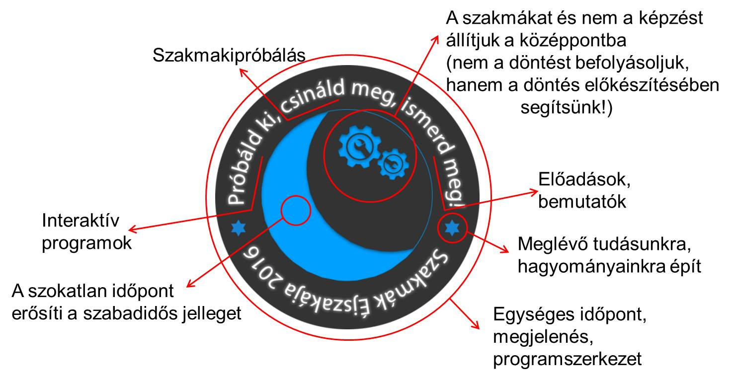 A logo elemei és magyarázata